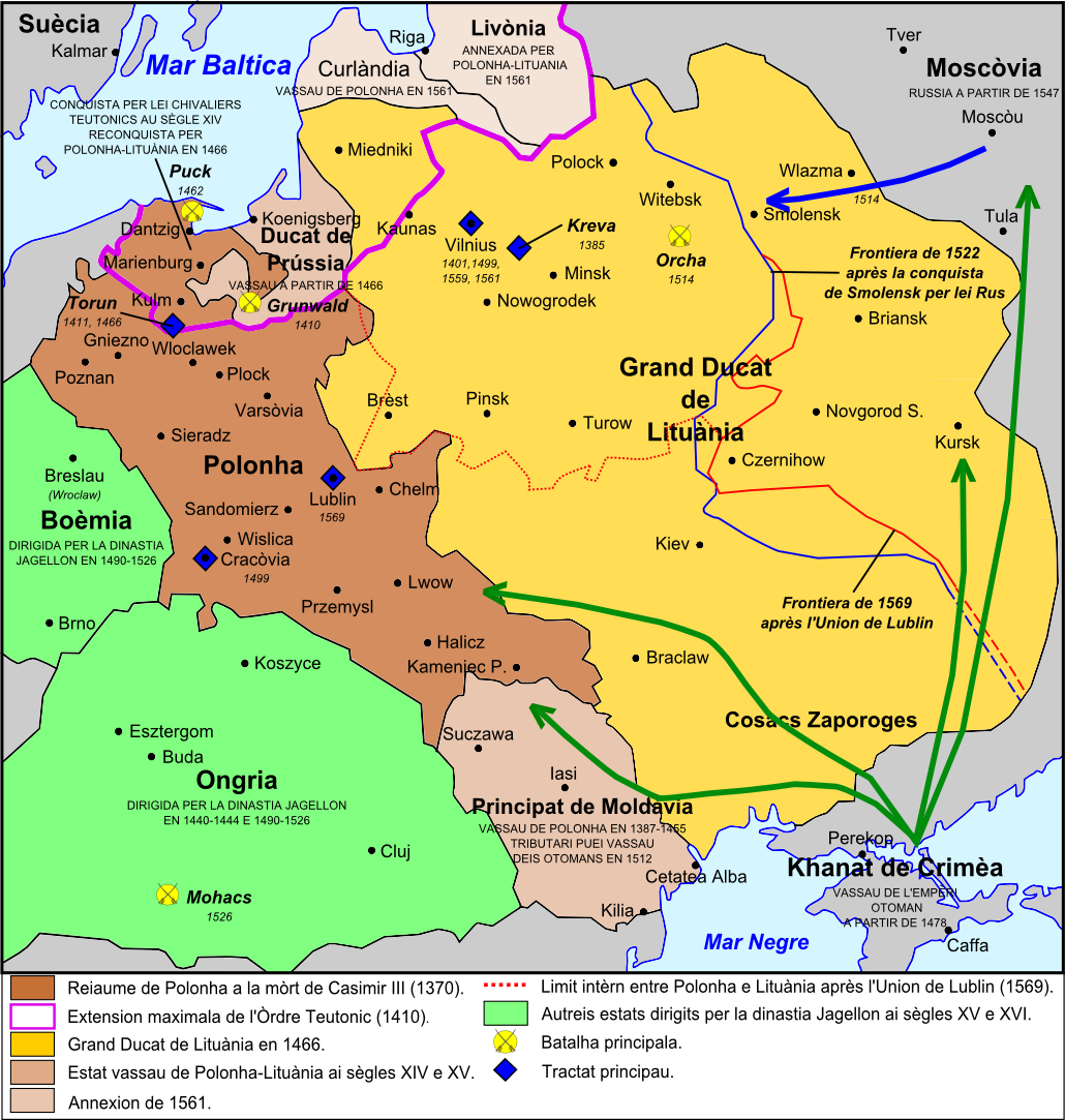 Polonha-Lituània dins lo corrent dau periòde de la dinastia dei Jagellon (1385-1572).